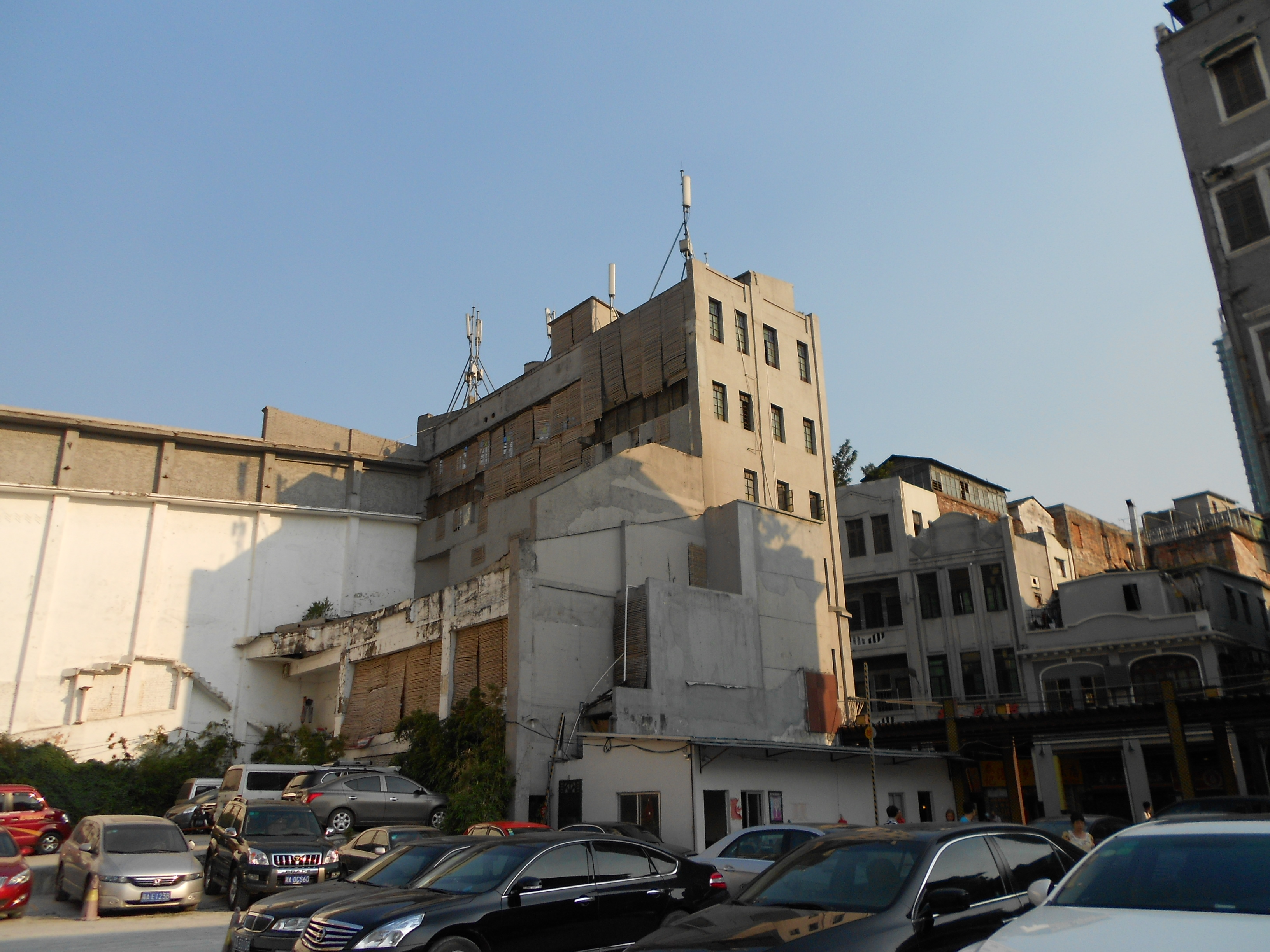 恩寧路舊城改造項目，到處是頹垣敗瓦。這是金聲戲院的背面，原建築被拆得只剩前面的外牆，當局亦因此招致社會的廣泛批評。